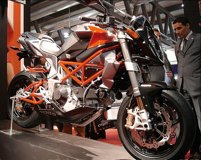 Bimota DB6 Delirio